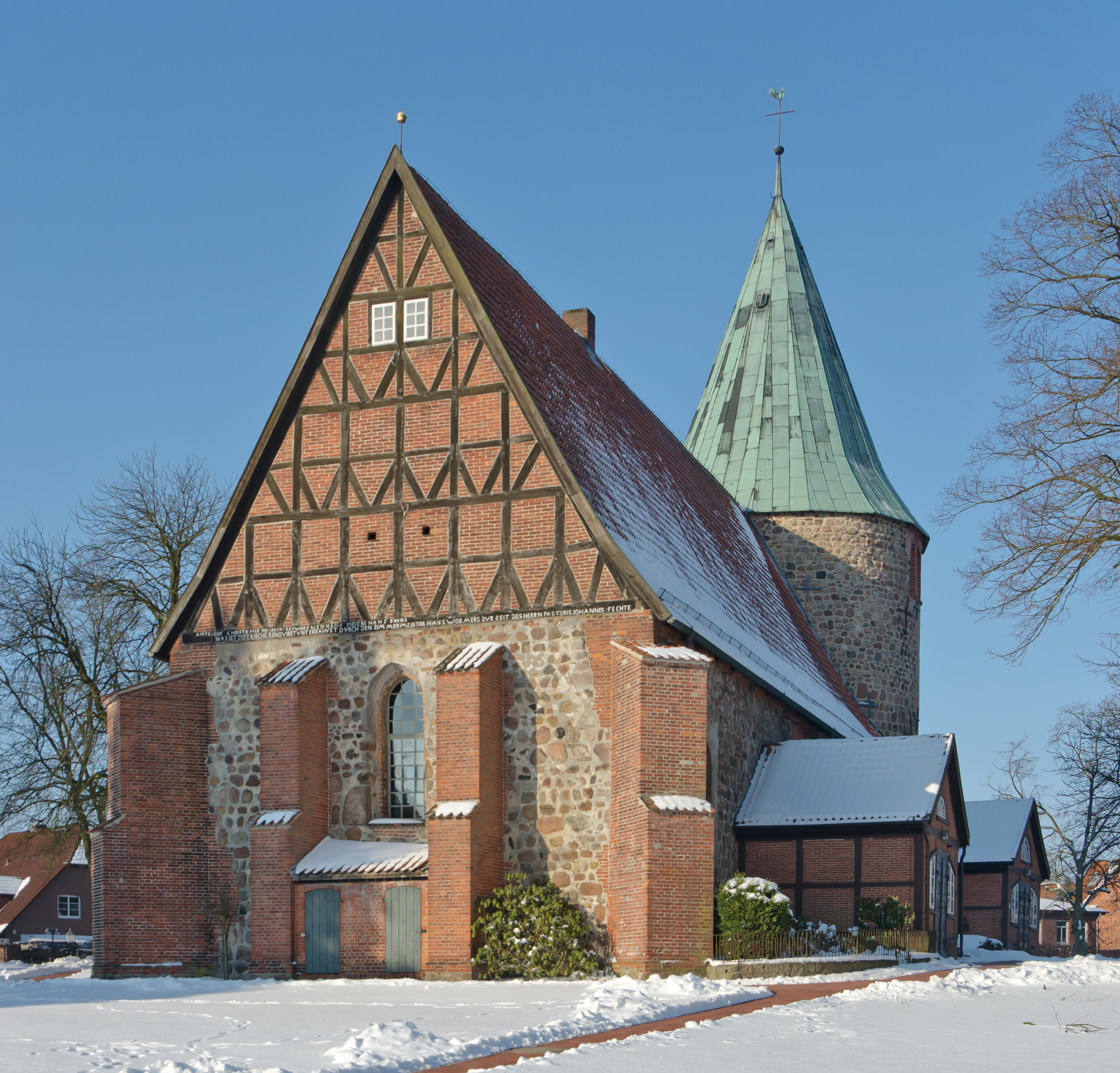 Salzhausen St Johannis